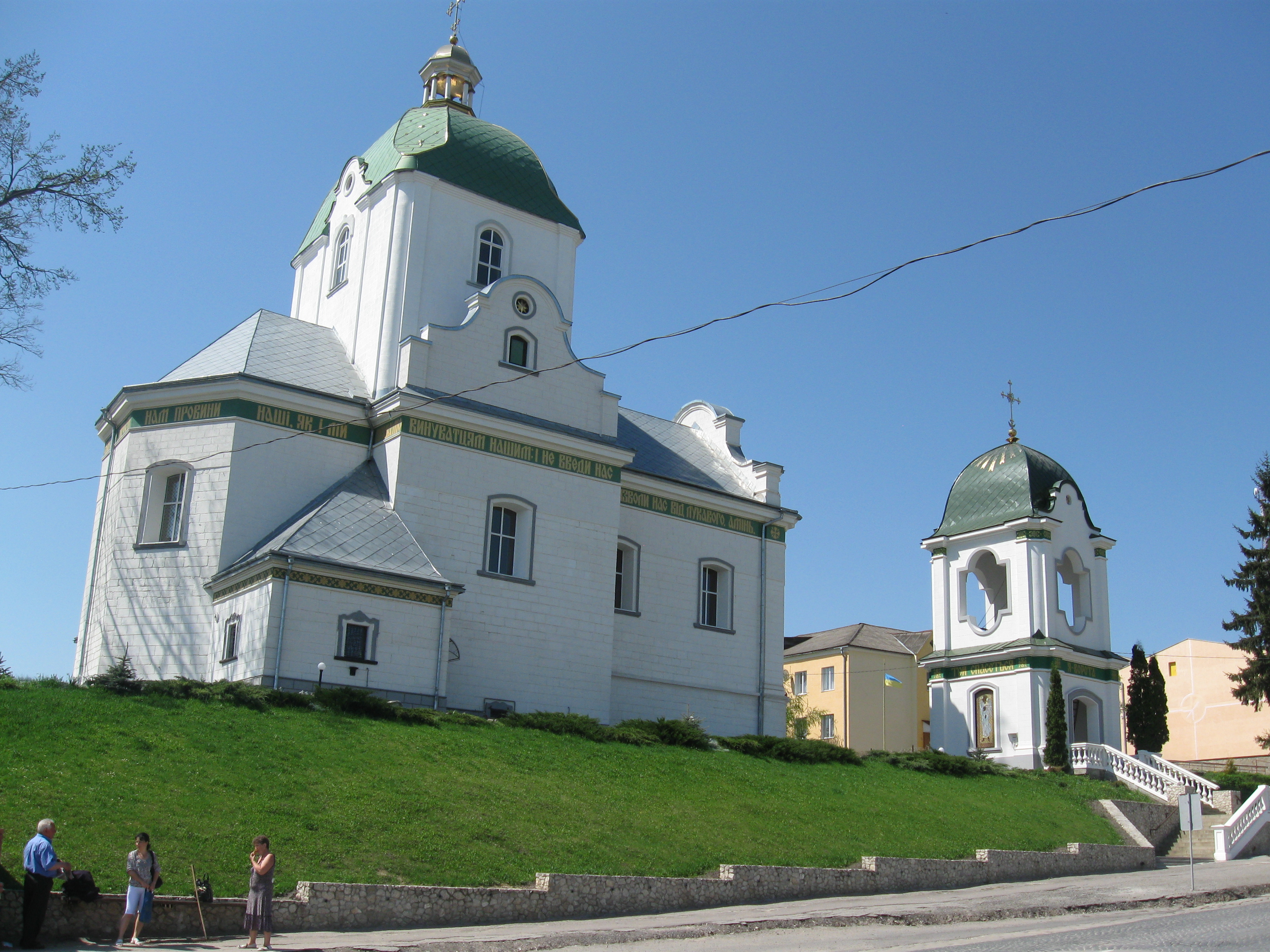 Церква в Зборові